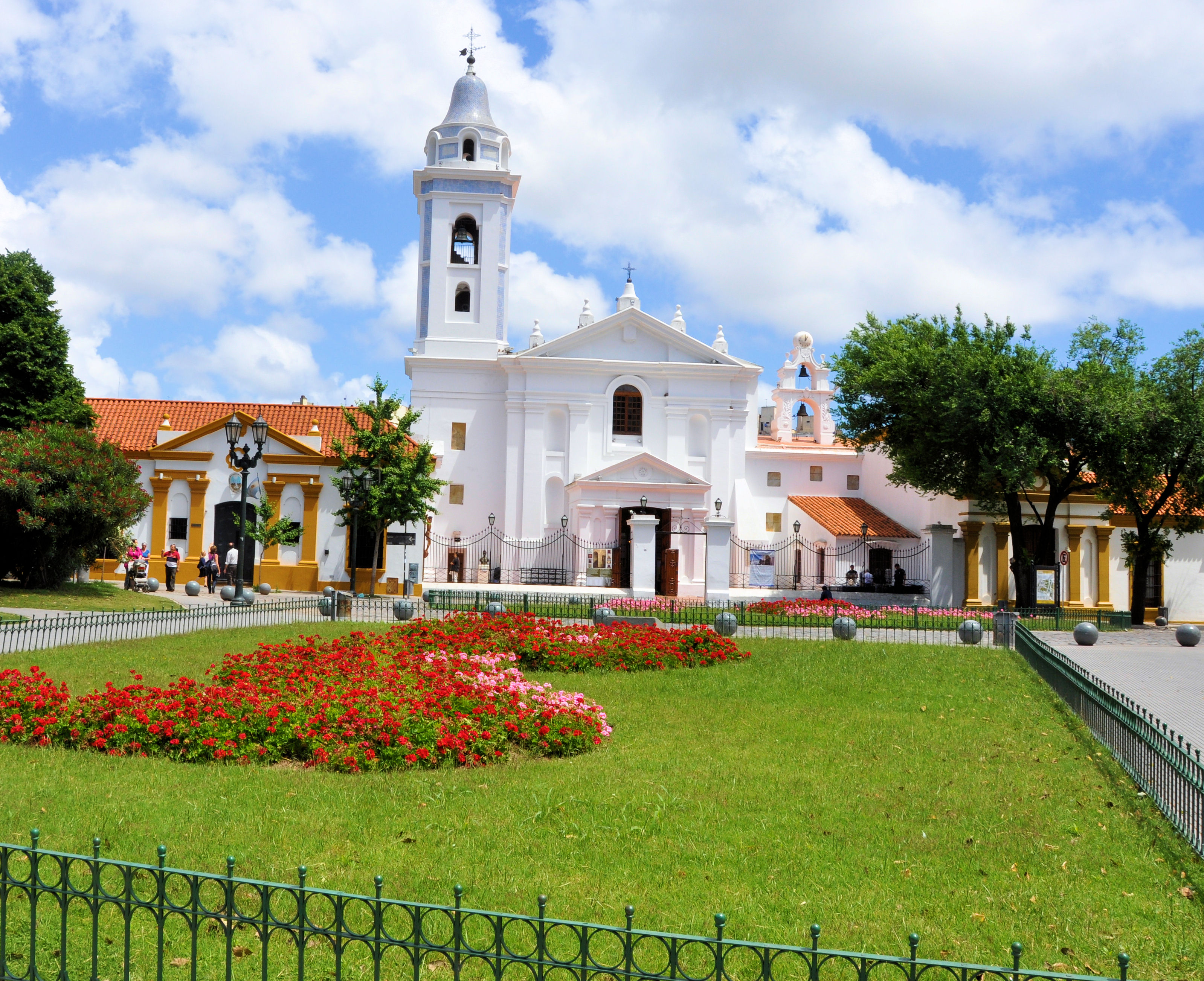 Buenos Aires - Recoleta - Basílica de Nuestra Señora del Pilar